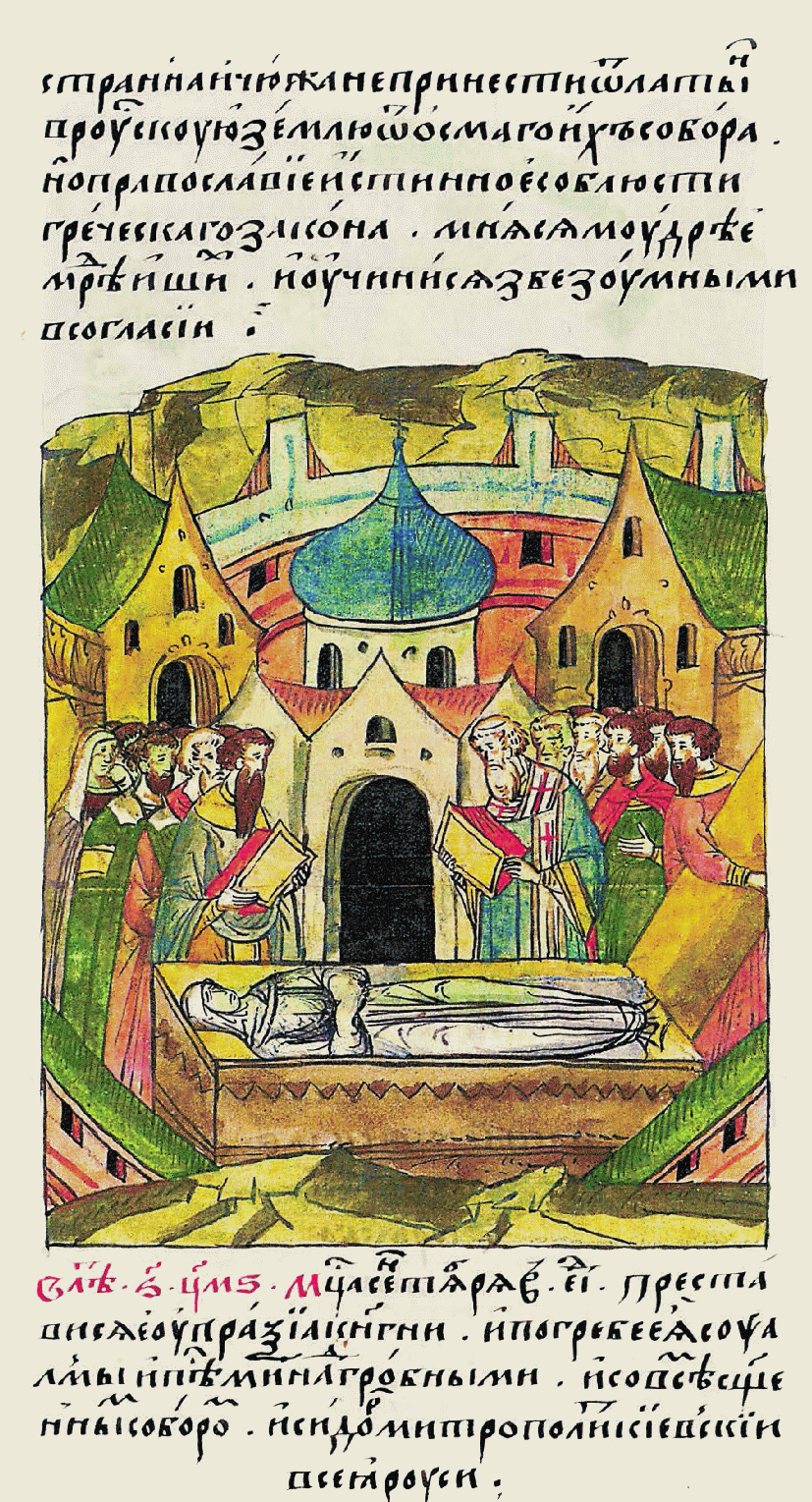 В 6946 году месяца сентября в 15 день преставилась княгиня Евпраксия, и похо- ронил ее с псалмами и надгробными пес- нопениями со всем освященным собором Исидор, митрополит Киевский и всея Руси.